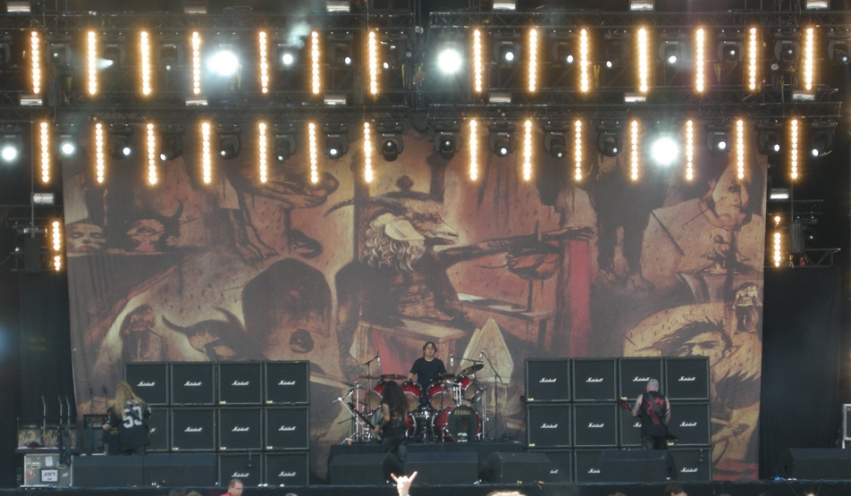 Slayer